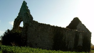 chapelle saint erguouefe vue de face